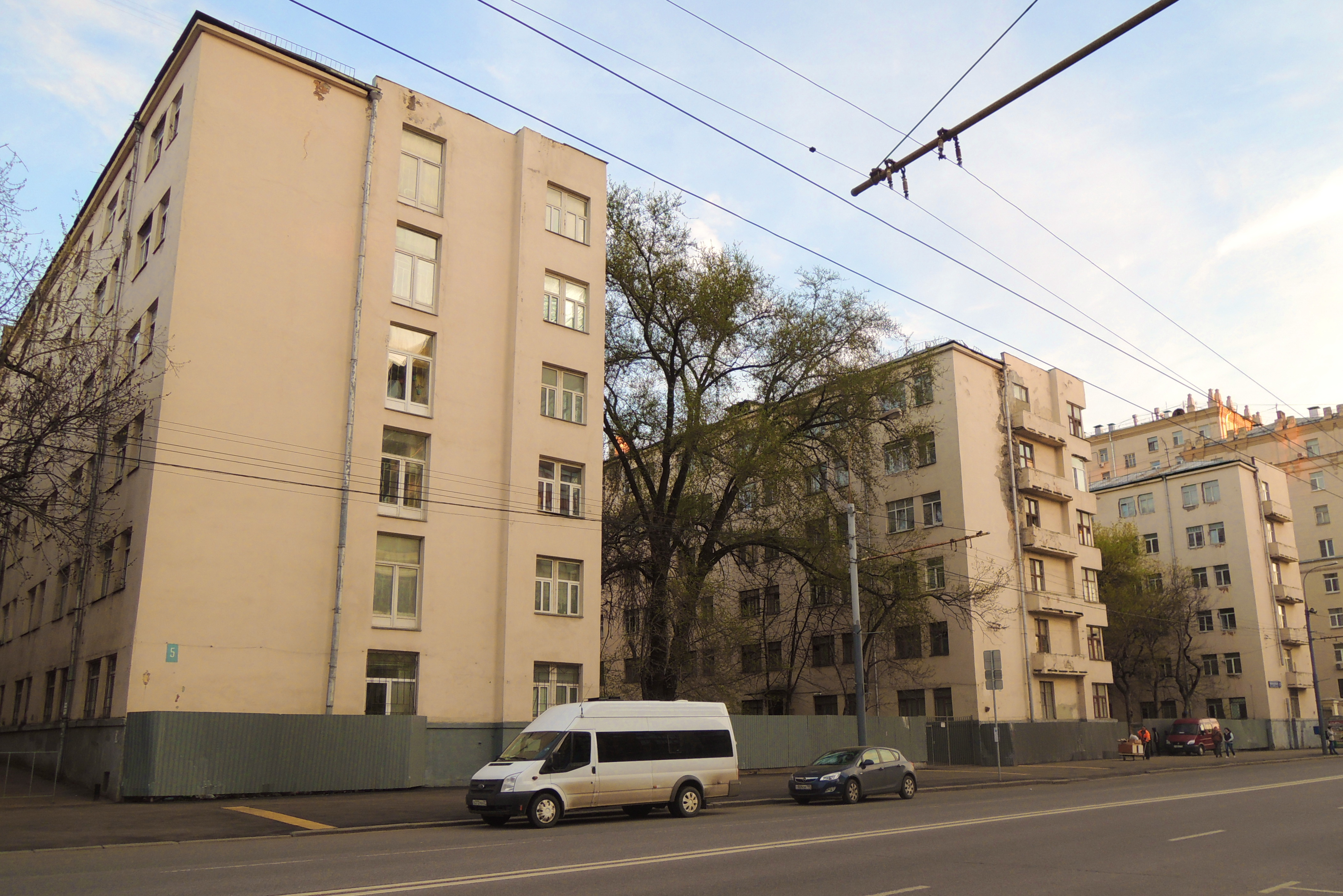 Комплекс общежитий Института красной профессуры строился в 1925-1928 гг. по проекту архитекторов Д.П. Осипова и А.М. Рухлядева. Дом-коммуна (Общежитие) состоит из 8 корпусов, расположенных в шахматном порядке и соединенных общим корпусом с галереями. Благодаря этому между зданиями получились уютные дворики. Здания украшают угловые окна, полукруглые выступы, скругленные балконы, ряды «косых» окон лестничных клеток. Секционная планировка обусловлена разнообразным режимом использования жилых помещений — как квартиры для постоянного проживания и как общежитие.